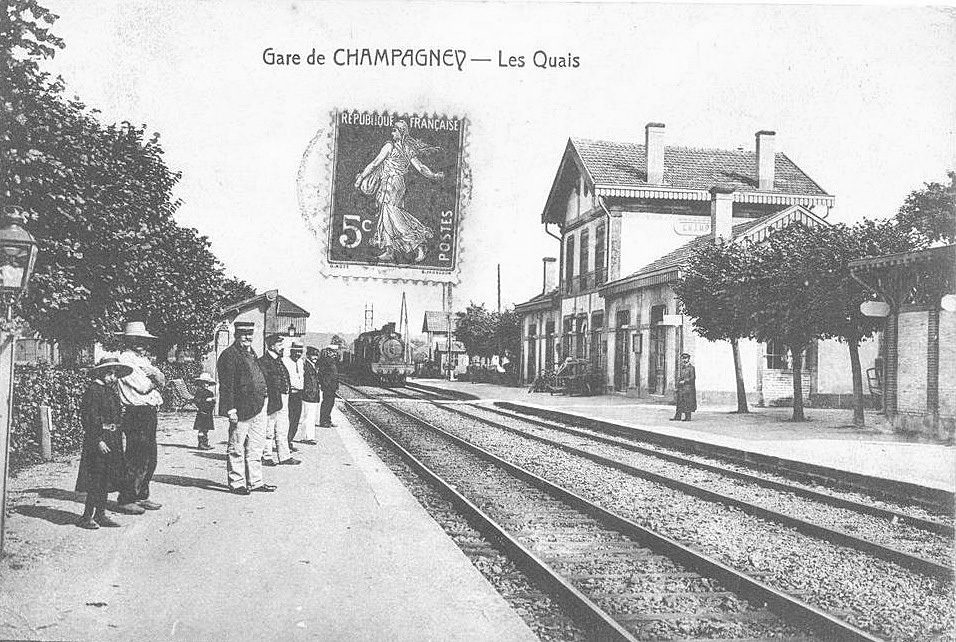 La gare de Champagney au début du XXème siècle.